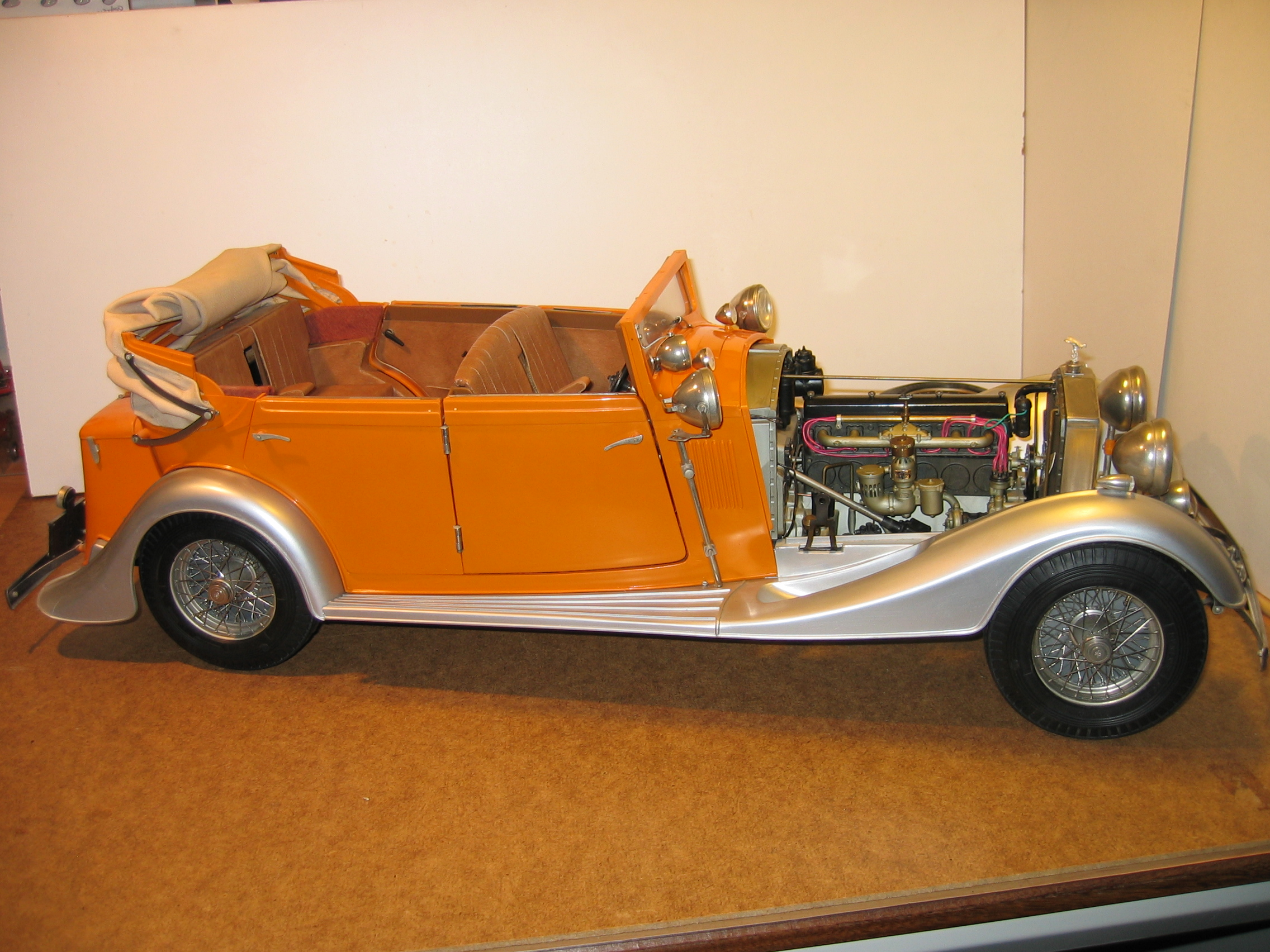 Eigen foto